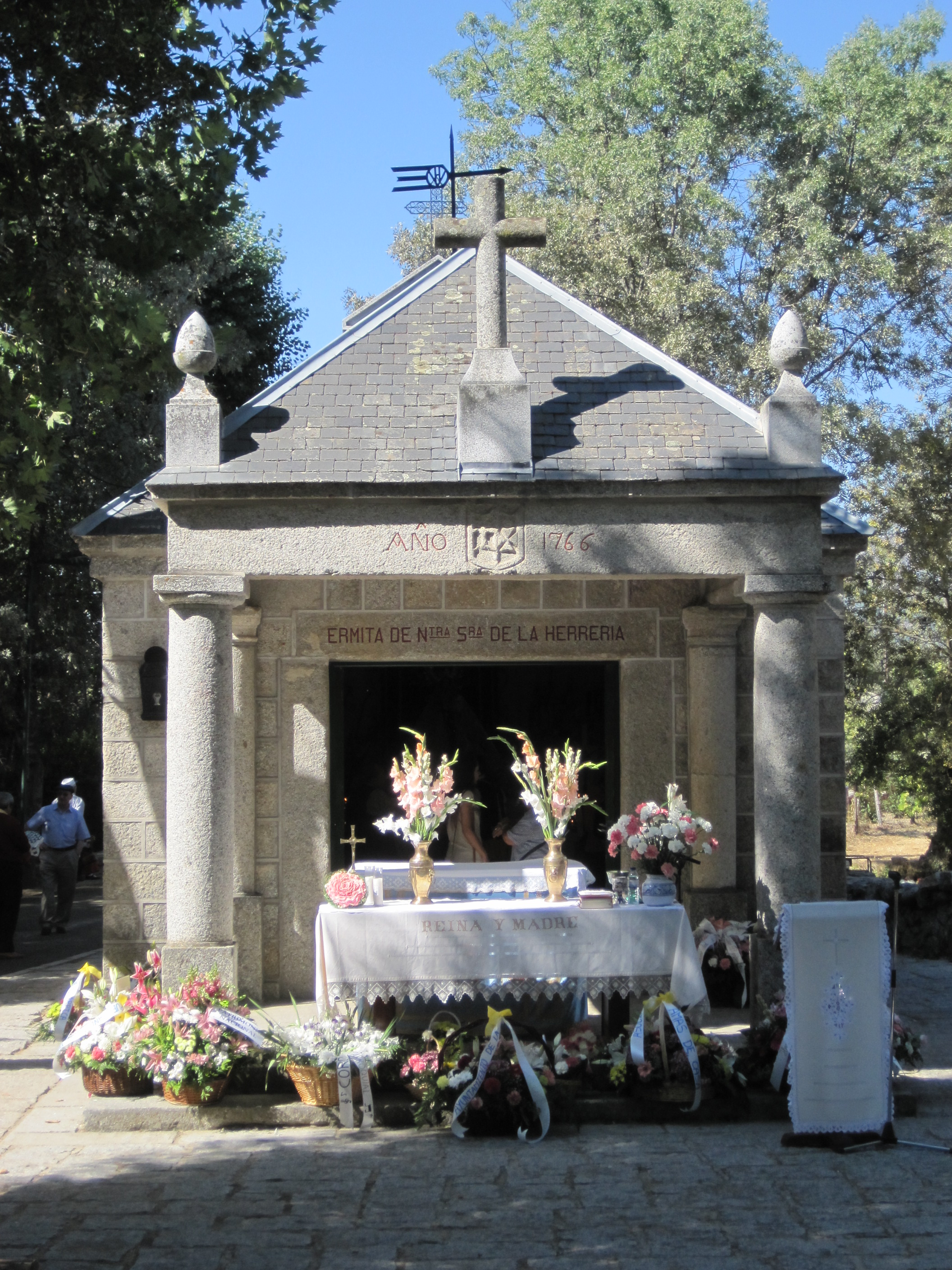 Romería en honor a la Virgen de la Herrería, en El Escorial (Madrid, España).